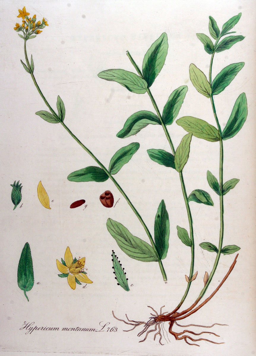 Hypericum montanum L.